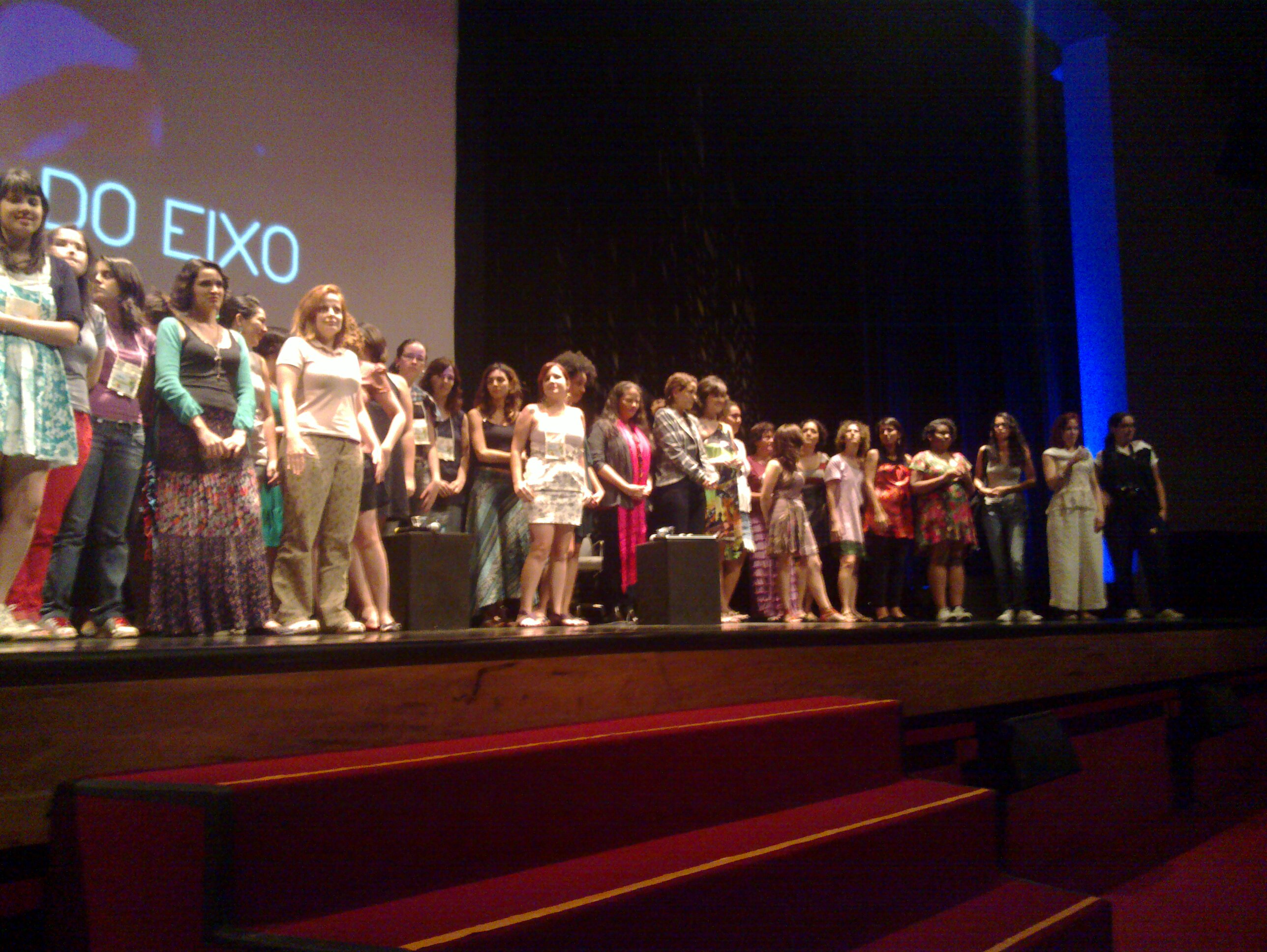 Congresso Fora do Eixo, abertura no auditório Ibirapuera, São Paulo, SP, Brasil